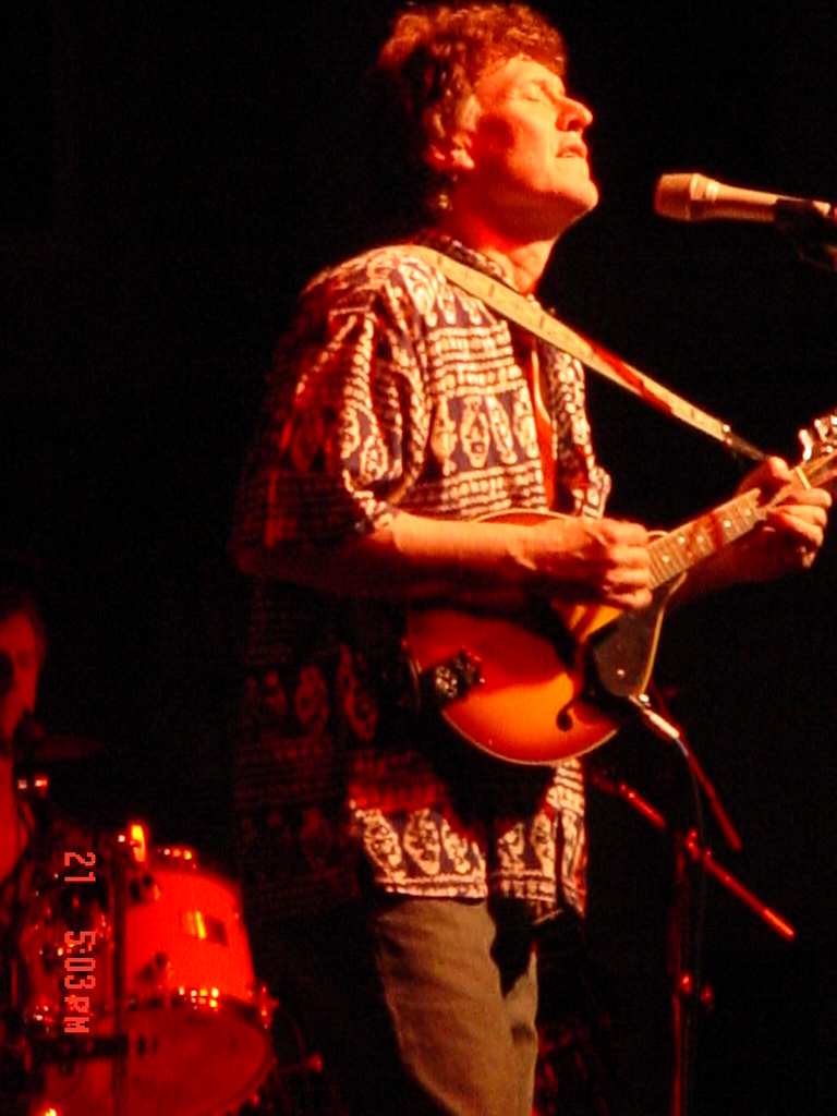 Steve Winwood, 2005, Knoxville, Tennessee